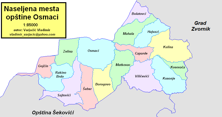 Opština Osmaci